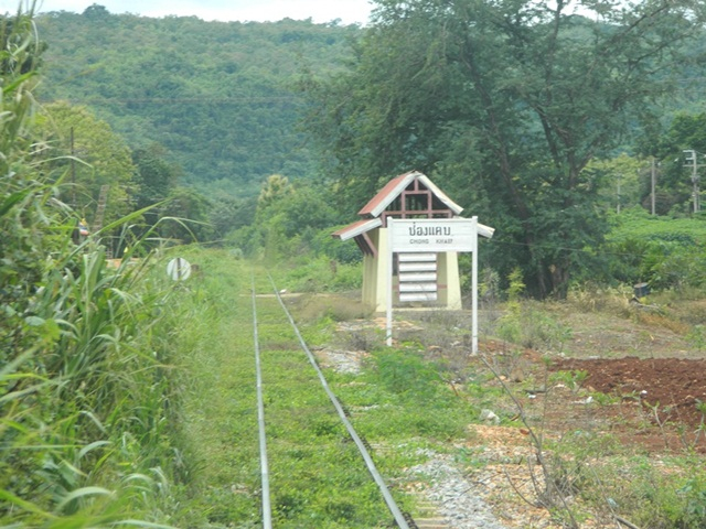 ภาพจากท้ายขบวนรถไฟ 909